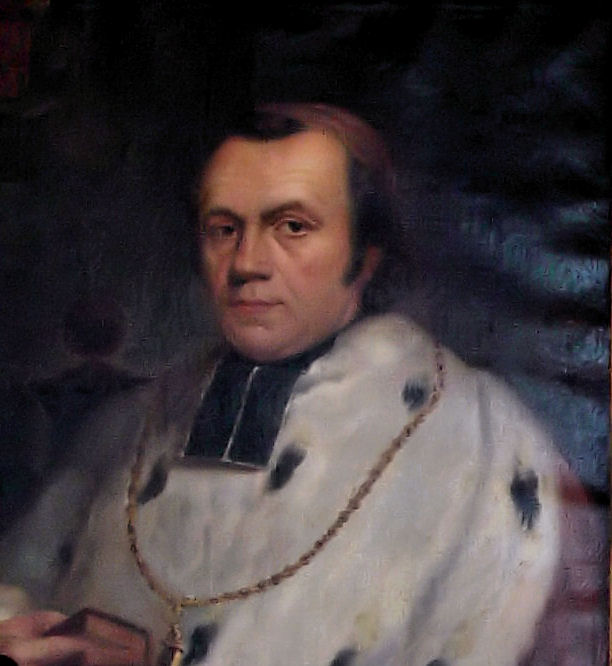 own work Van de Velde